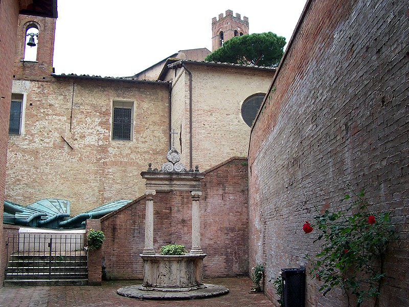 Siena - Santuario della Casa di S. Caterina (Pozzo)